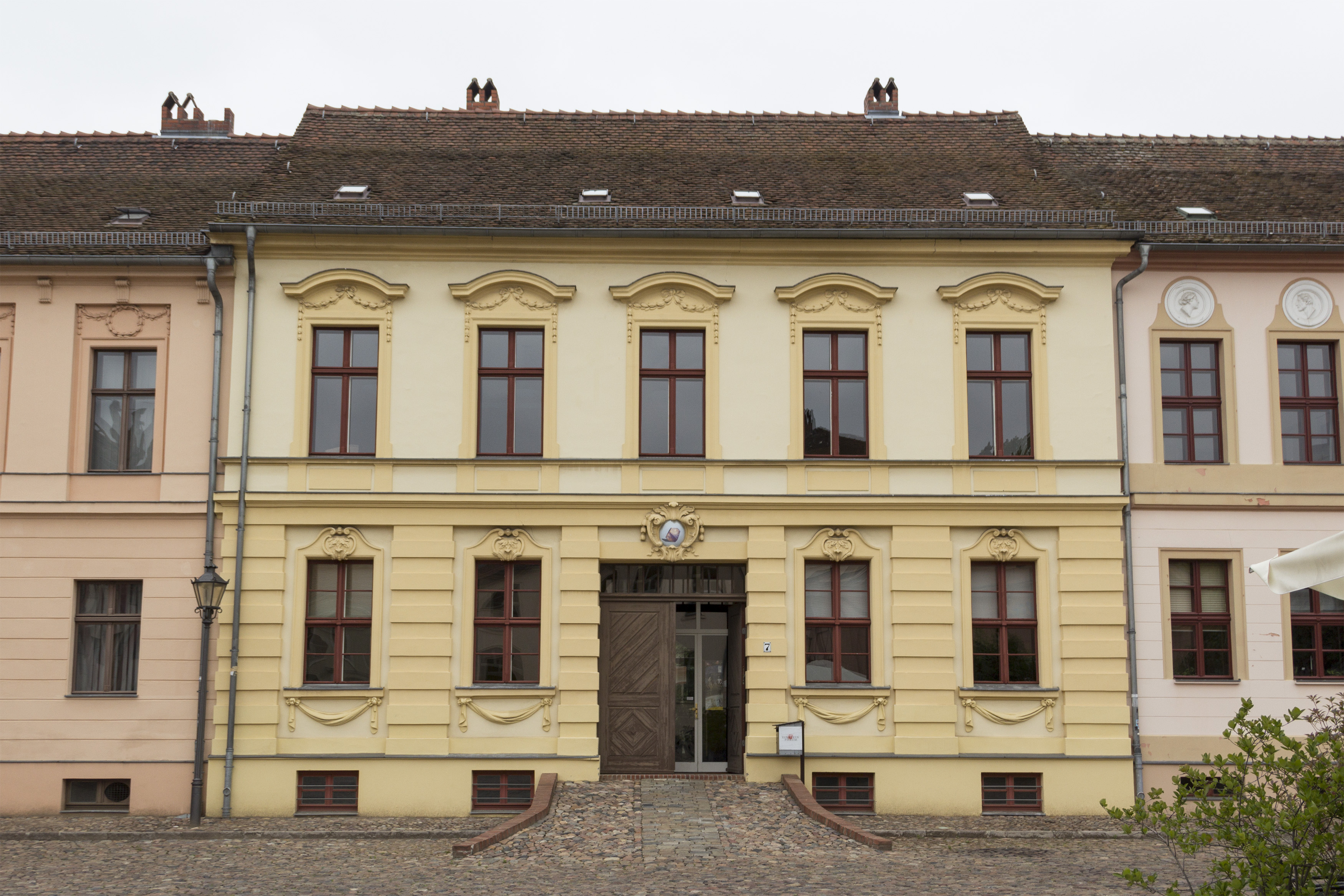 Denkmalgeschütztes Bürgerhaus Am Neuen Markt 7 in Potsdam, Sitz des Einstein Forums